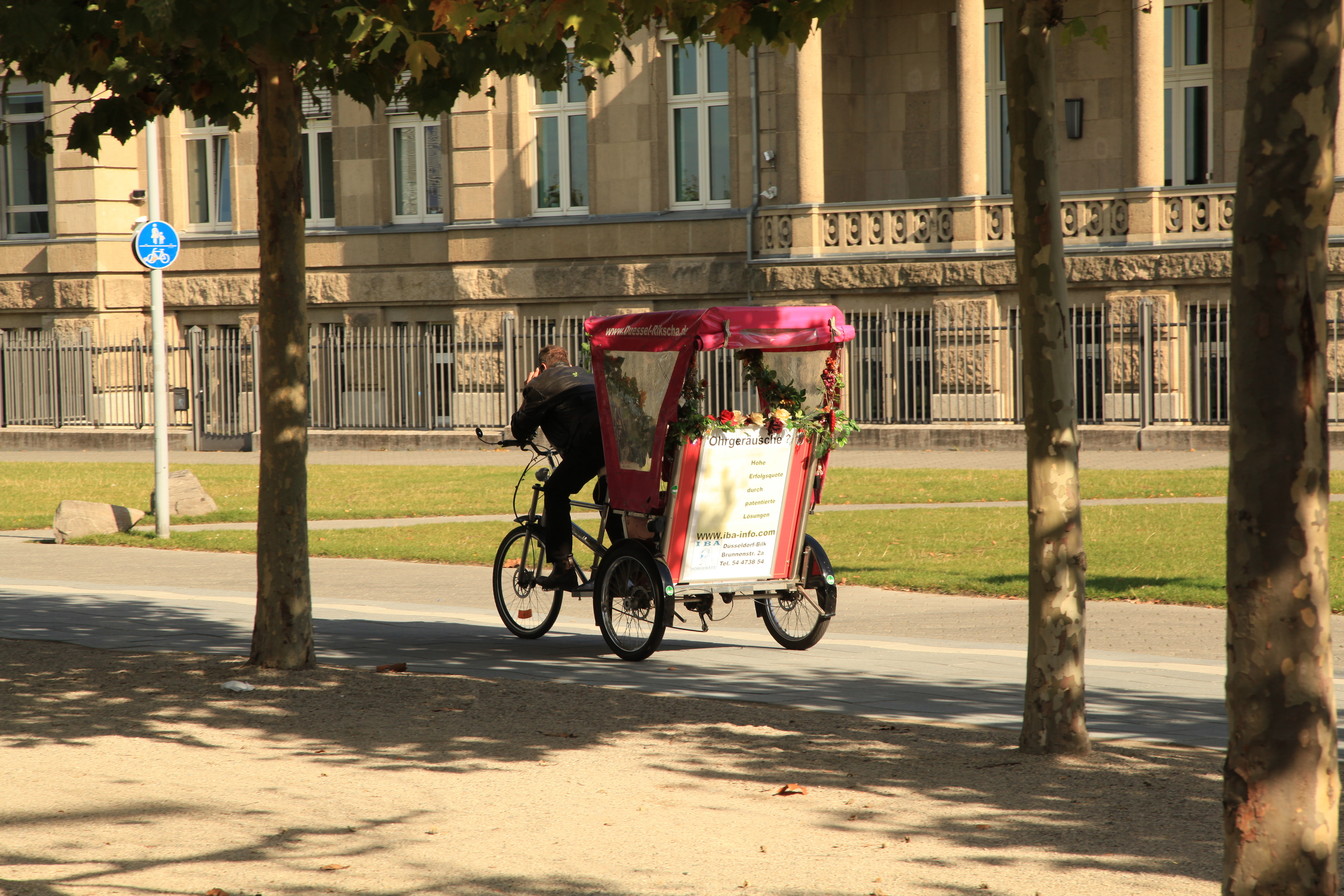 Mannesmannufer in Düsseldorf